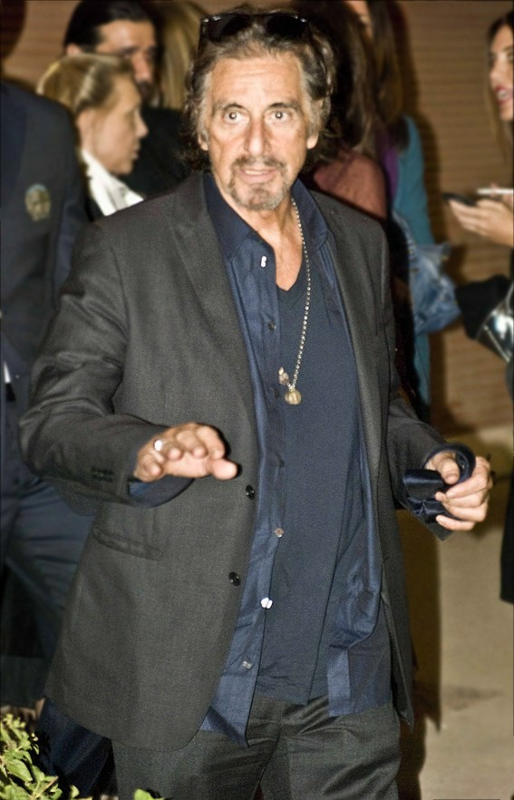 Alfredo James Pacino all'uscita dal backstage dopo la conferenza tenuta al ROMA FILM FEST 2008